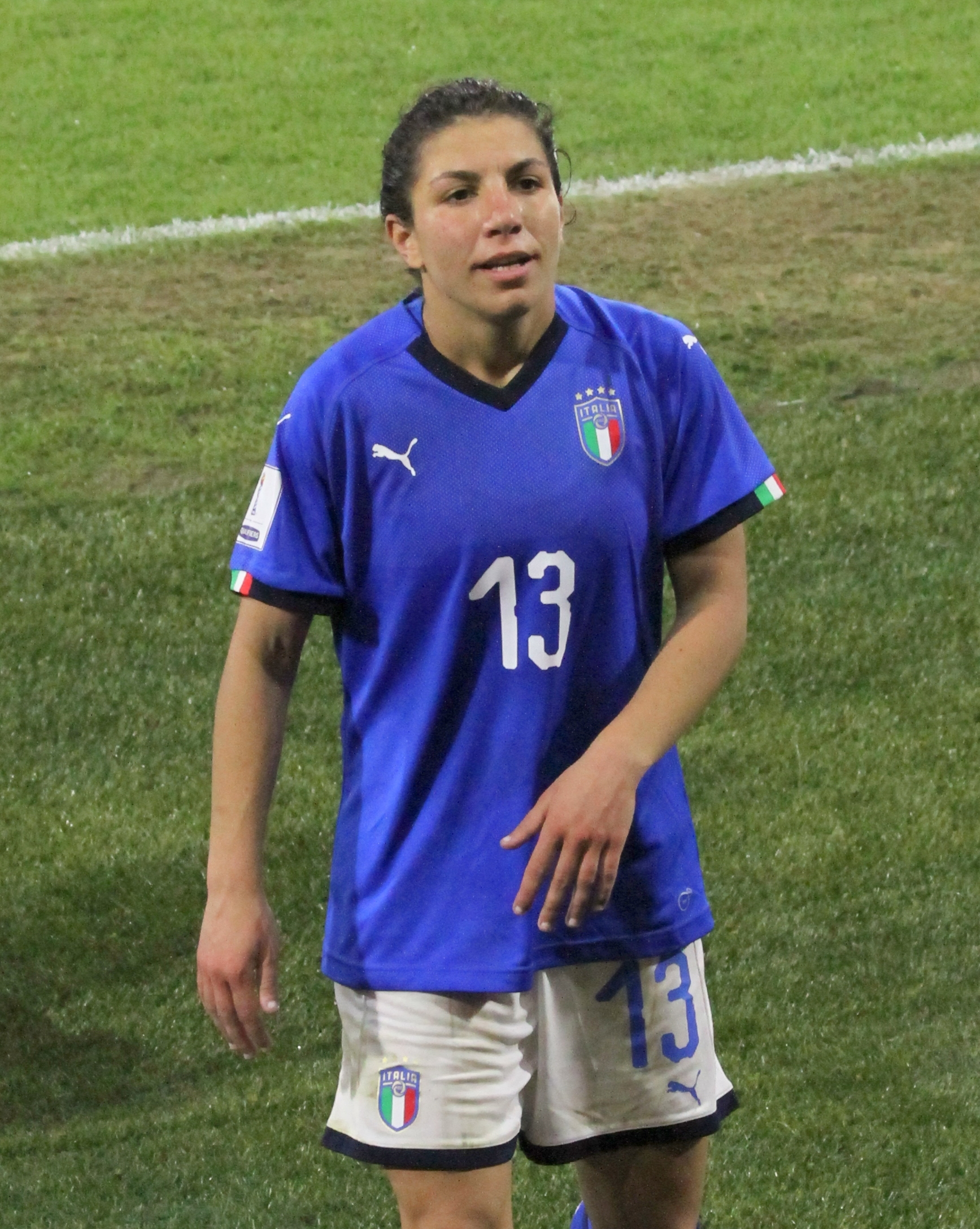 Elisa Bartoli, nazionale di calcio femminile dell'Italia, a fine incontro Italia-Belgio del 10 aprile 2018 allo stadio Mazza di Ferrara.